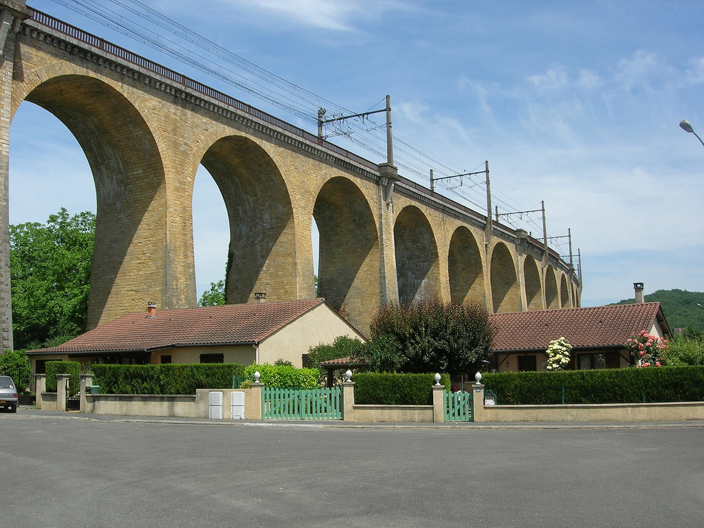 Viaduc SNCF de Souillac France